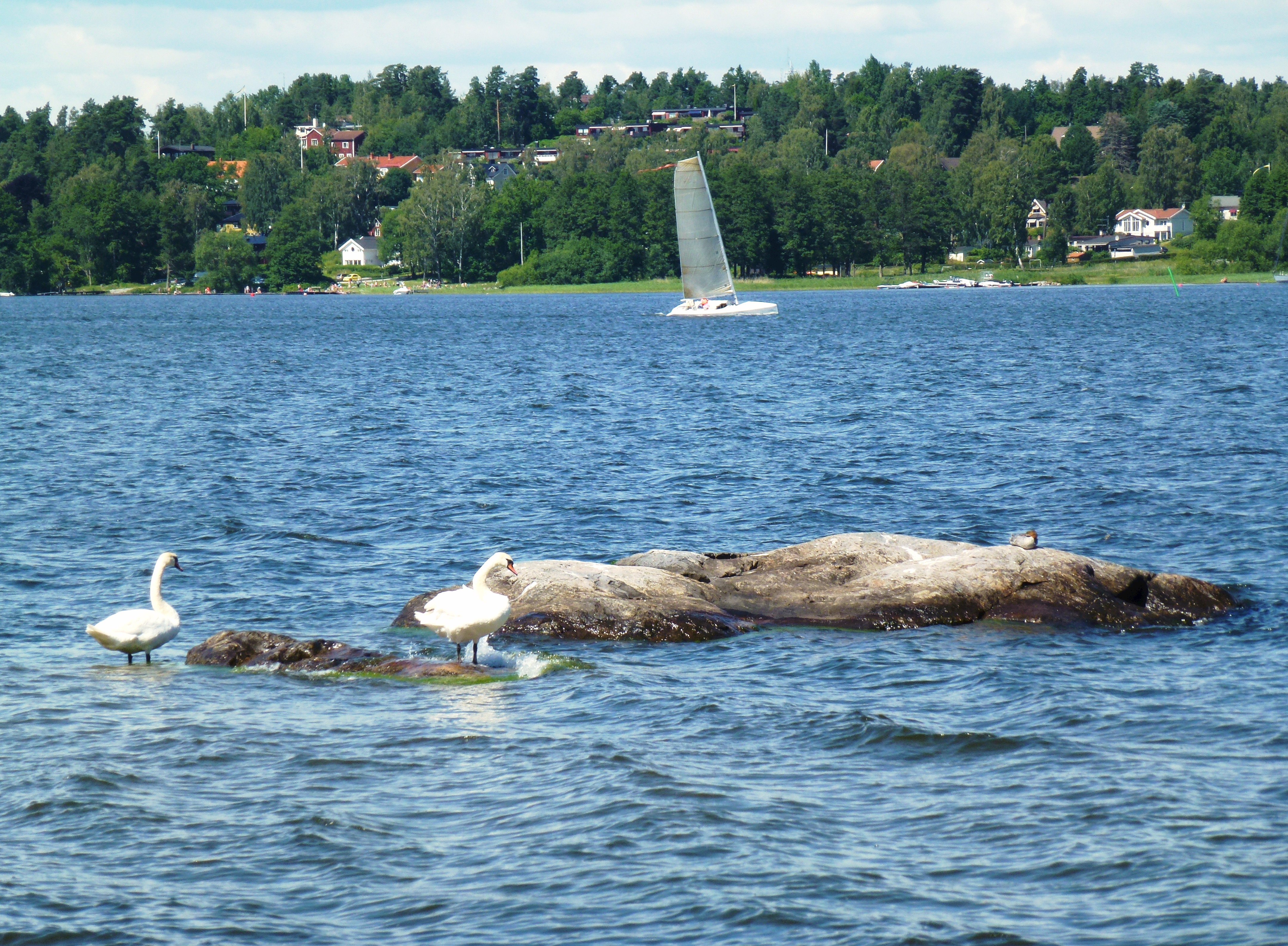 Mälarpromenaden vy över Mälaren